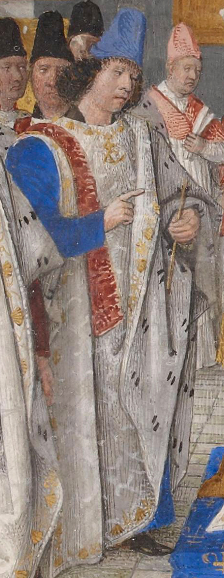 Un chevalier de l'ordre de Saint-Michel, peut-être Antoine de Chabannes. Détail de l'enluminure en frontispice des Statuts de l'ordre de Saint-Michel, exemplaire destiné à Louis XI.